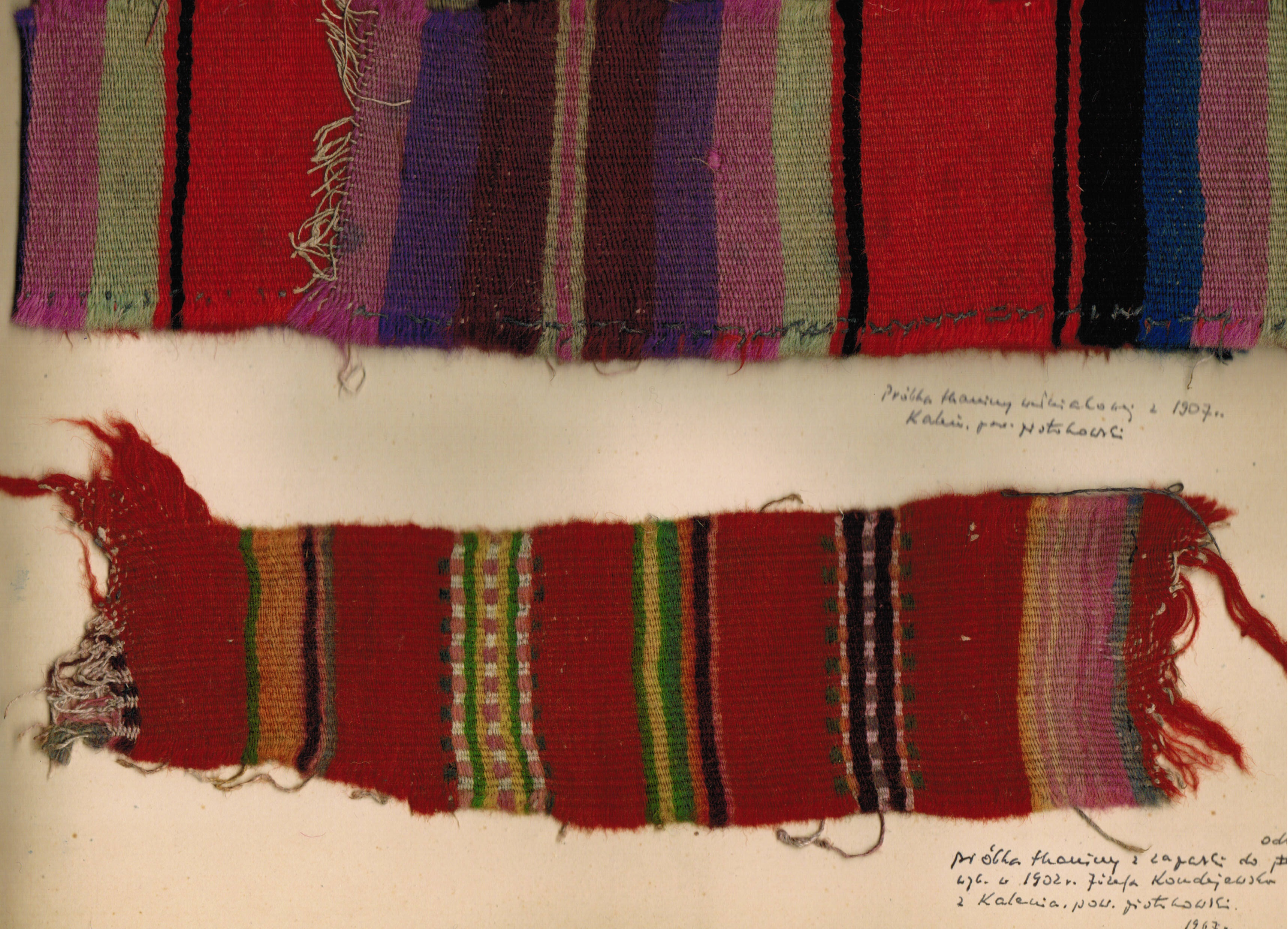 Dokumentacja terenowa znajdująca się w zbiorach Archiwum Polskiego Towarzystwa Ludoznawczego we Wrocławiu